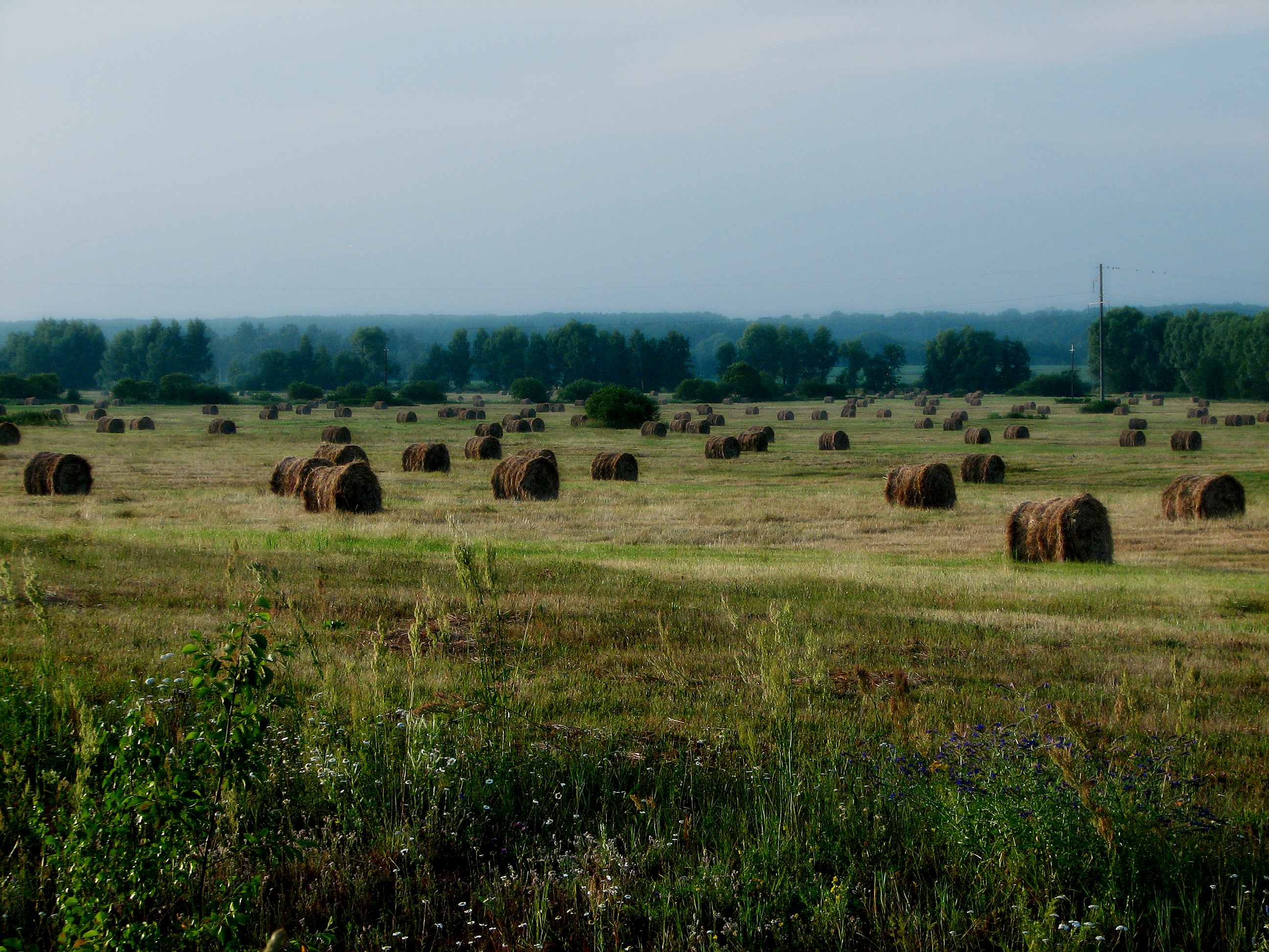 Suvine Soomaa rahvuspark